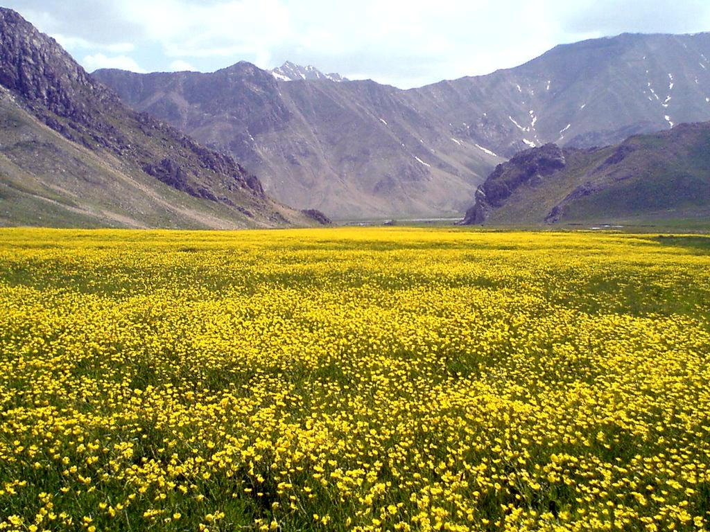 کوههای خرسنگ پارک، دشت لار، ارتفاعات البرز.